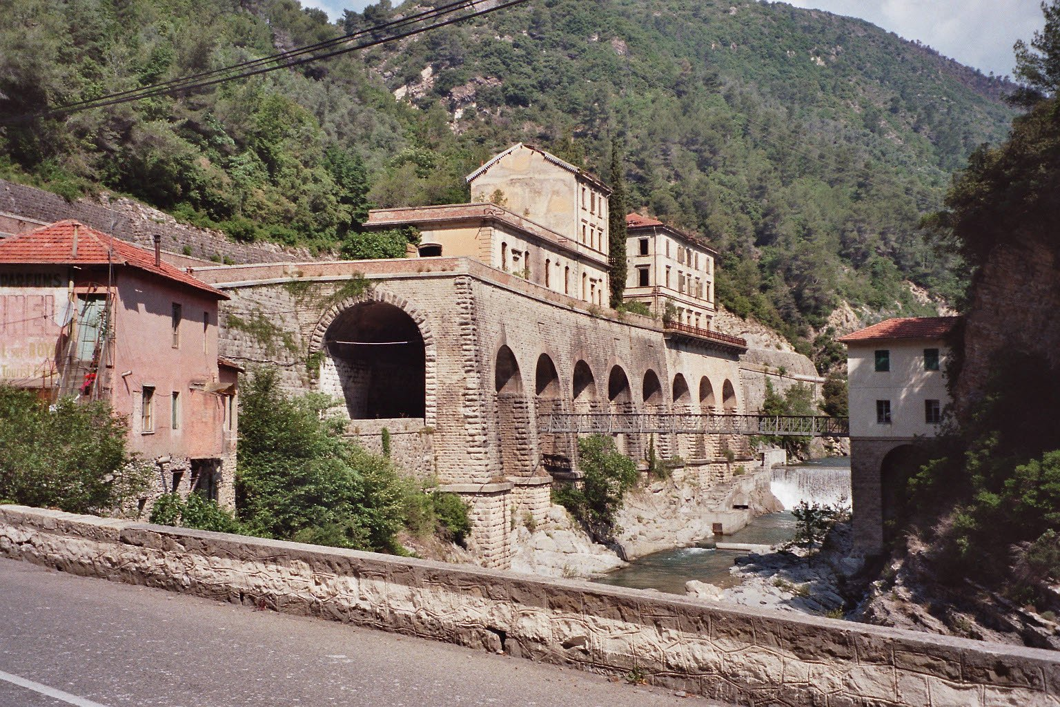 Der Bahnhof Piena der Tendabahn von der Rückseite.